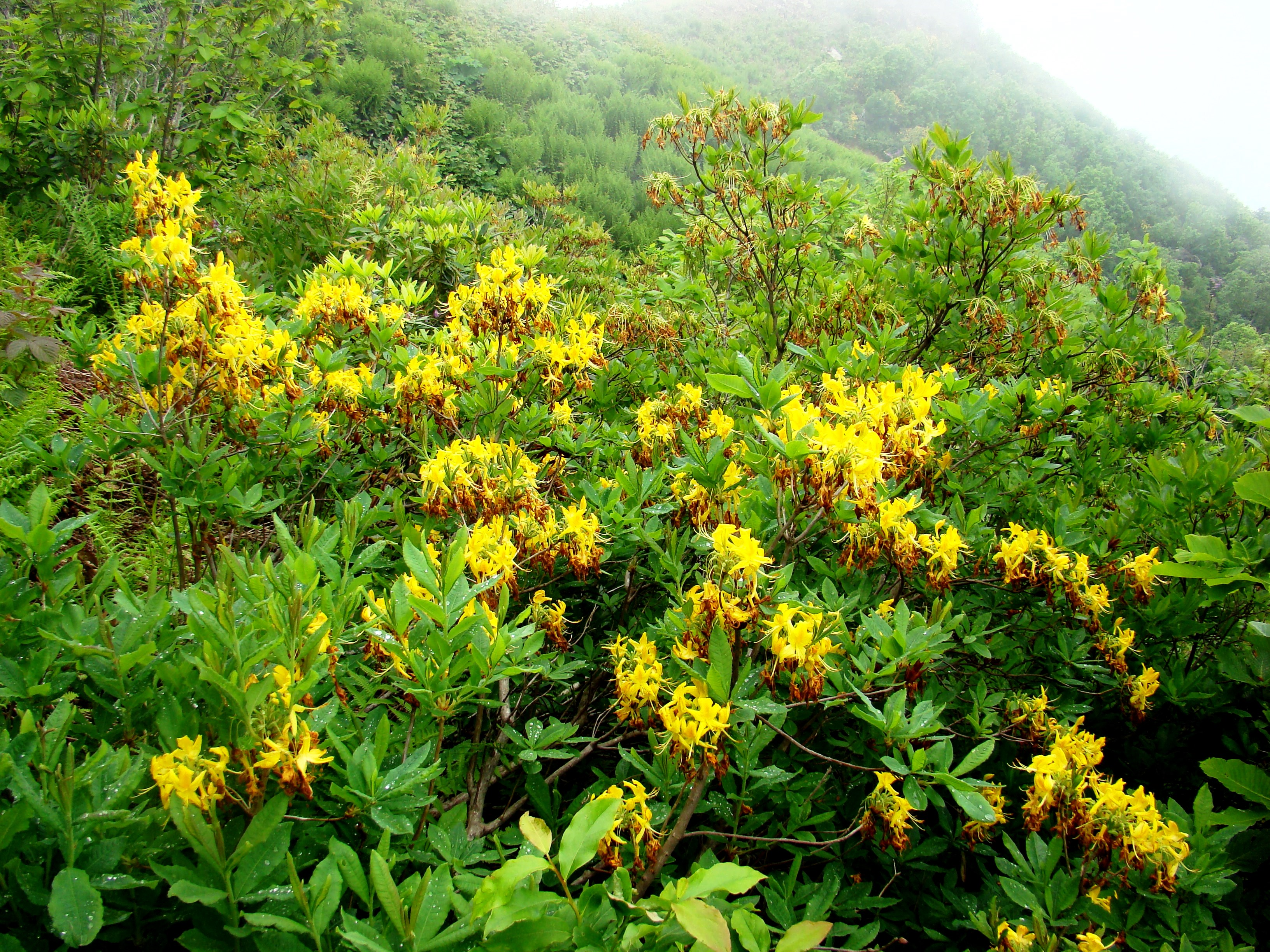 Rhododendron luteum